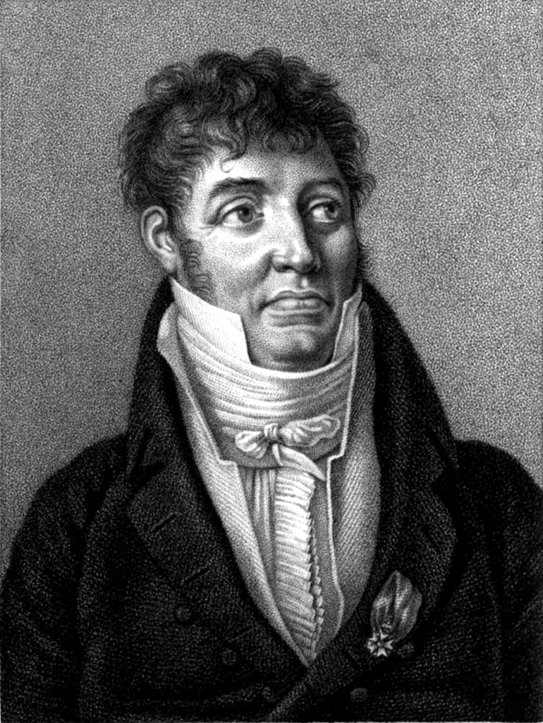 Estampe de Pierre-Antoine-Augustin de Piis (1755-1832).